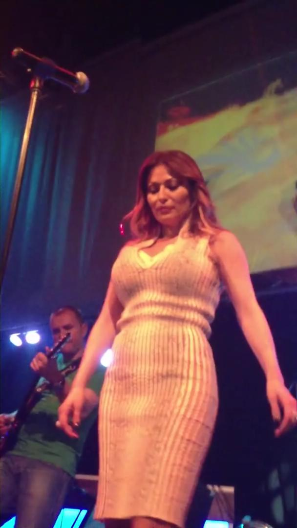 Ceca u Dizeldorfu 2012